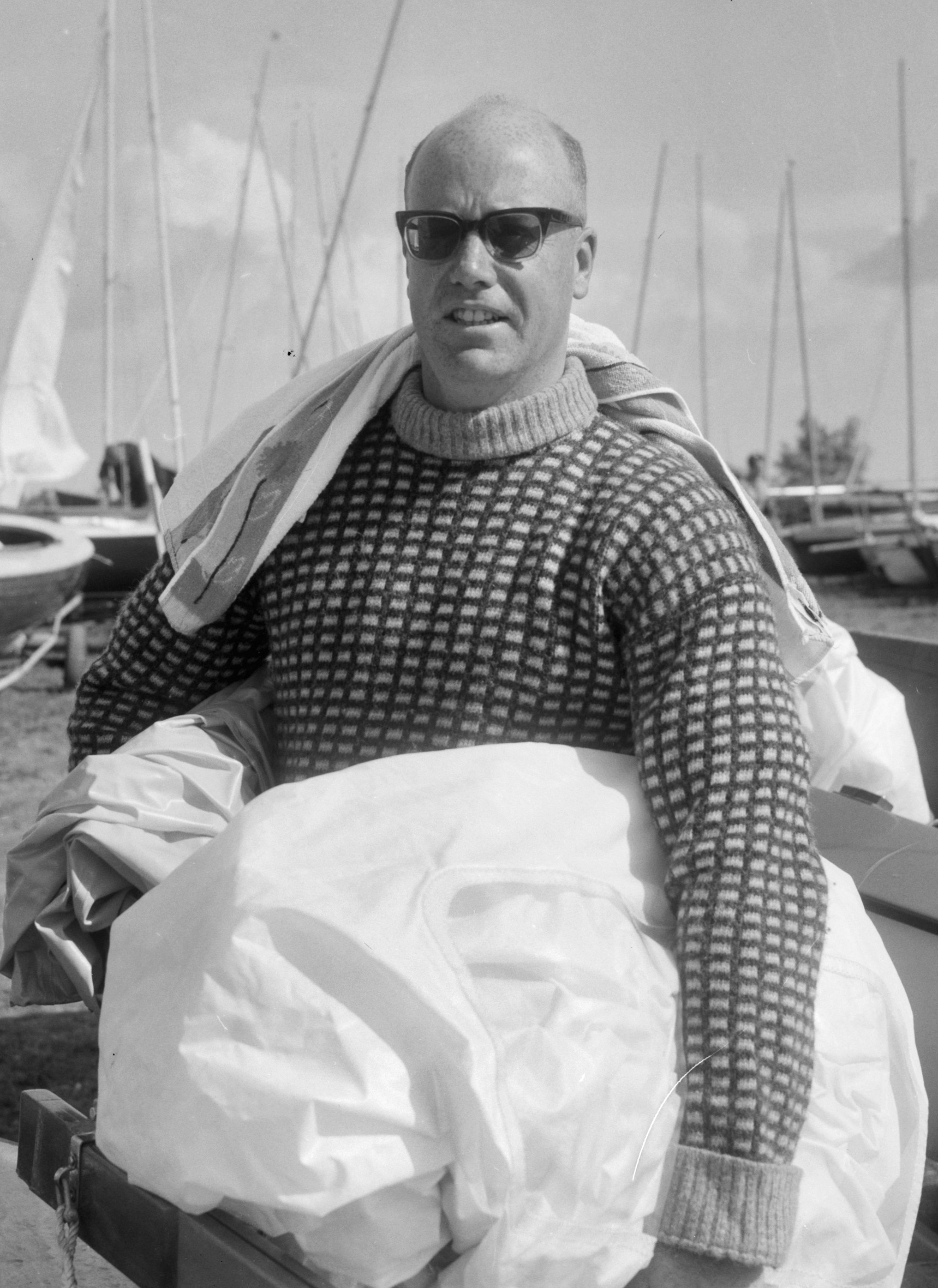 Zeilers voor Tokio, H. Willems